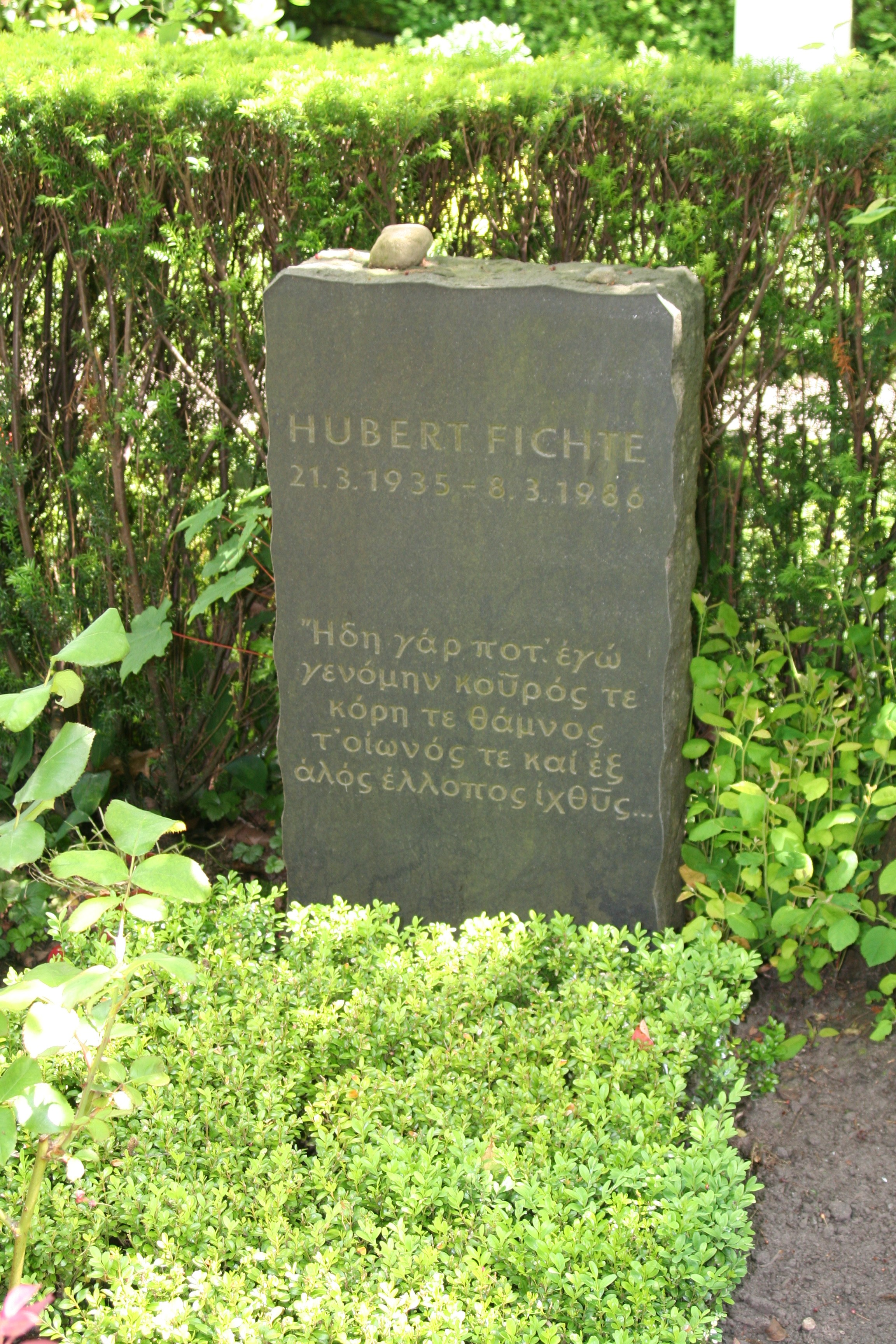 Grab von Hubert Fichte auf dem Nienstedtener Friedhof in Hamburg